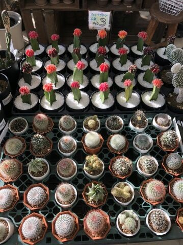 春日井市のファーマーズマーケット「ぐぅぴぃひろば」にて販売されているサボテン